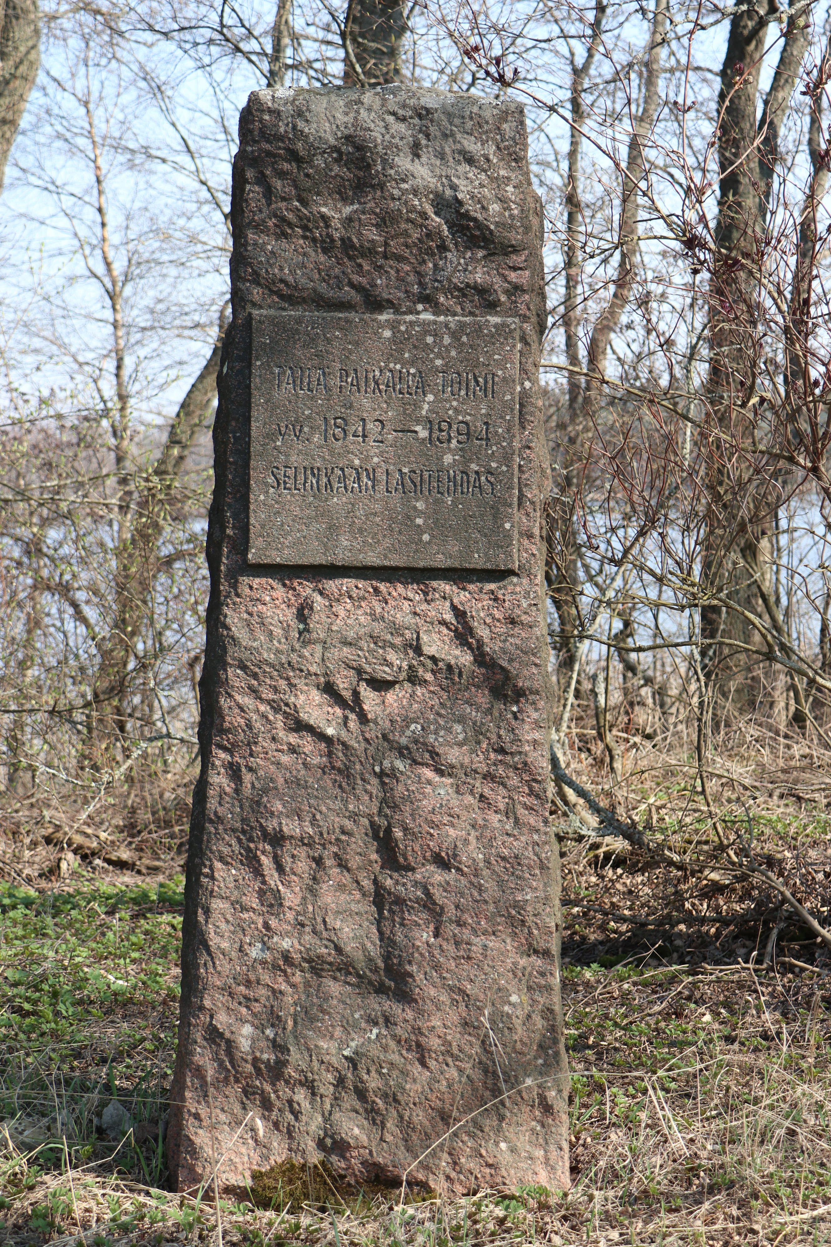 Sälinkään lasitehtaan muistokivi Mäntsälän Sälinkään kylässä, Järvikulmantien varressa Kilpijärven rannalla. Laatassa teksti "Tällä paikalla toimi vv. 1842-1894 Sälinkään lasitehdas".